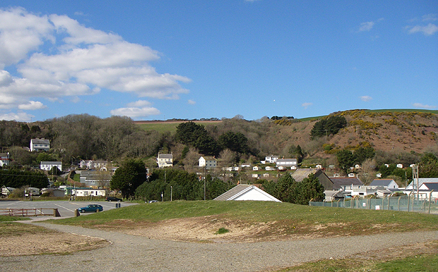 Pendine